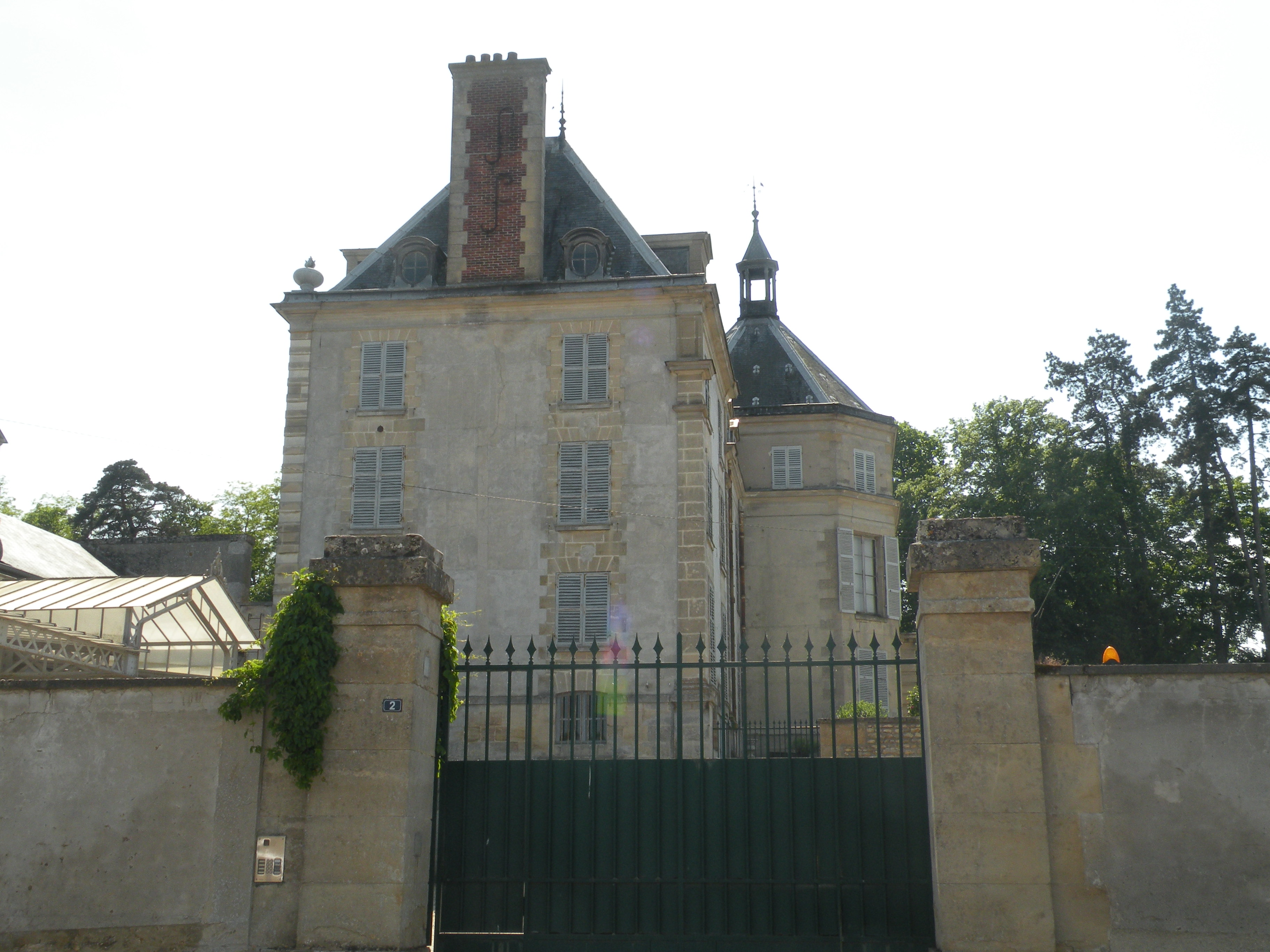 château de Neuilly-en-Vexin